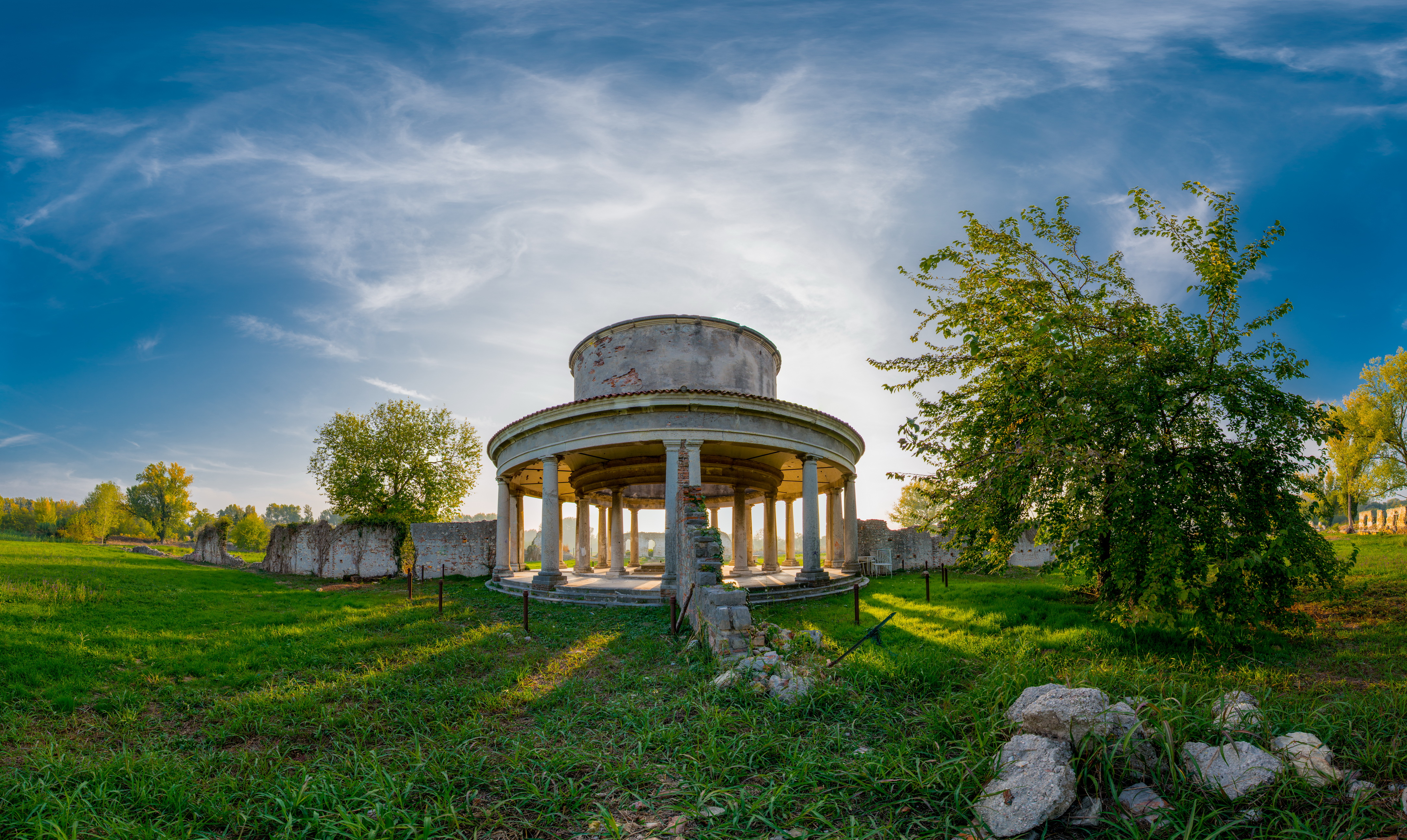 Lazzaretto di Verona - Questa foto rappresenta il tempio centrale del Lazzaretto di Verona di scuola Sanmicheliana in cui venivano celebrate le liturgie eucaristiche ed essendo al centro del comprensorio tutti gli ammalati dalle loro celle potevano assistere ed ascoltare distintamente la voce del prete durante le messe This is a photo of a monument which is part of cultural heritage of Italy.